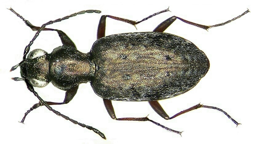 Familie: Carabidae Grösse: 5,5-7,4 mm Verbreitung: Europa Fundort: Germania, Oberbayern, Oberstdorf, 2100 m leg.det. U.Schmidt, 2002 Foto: U.Schmidt, 2008